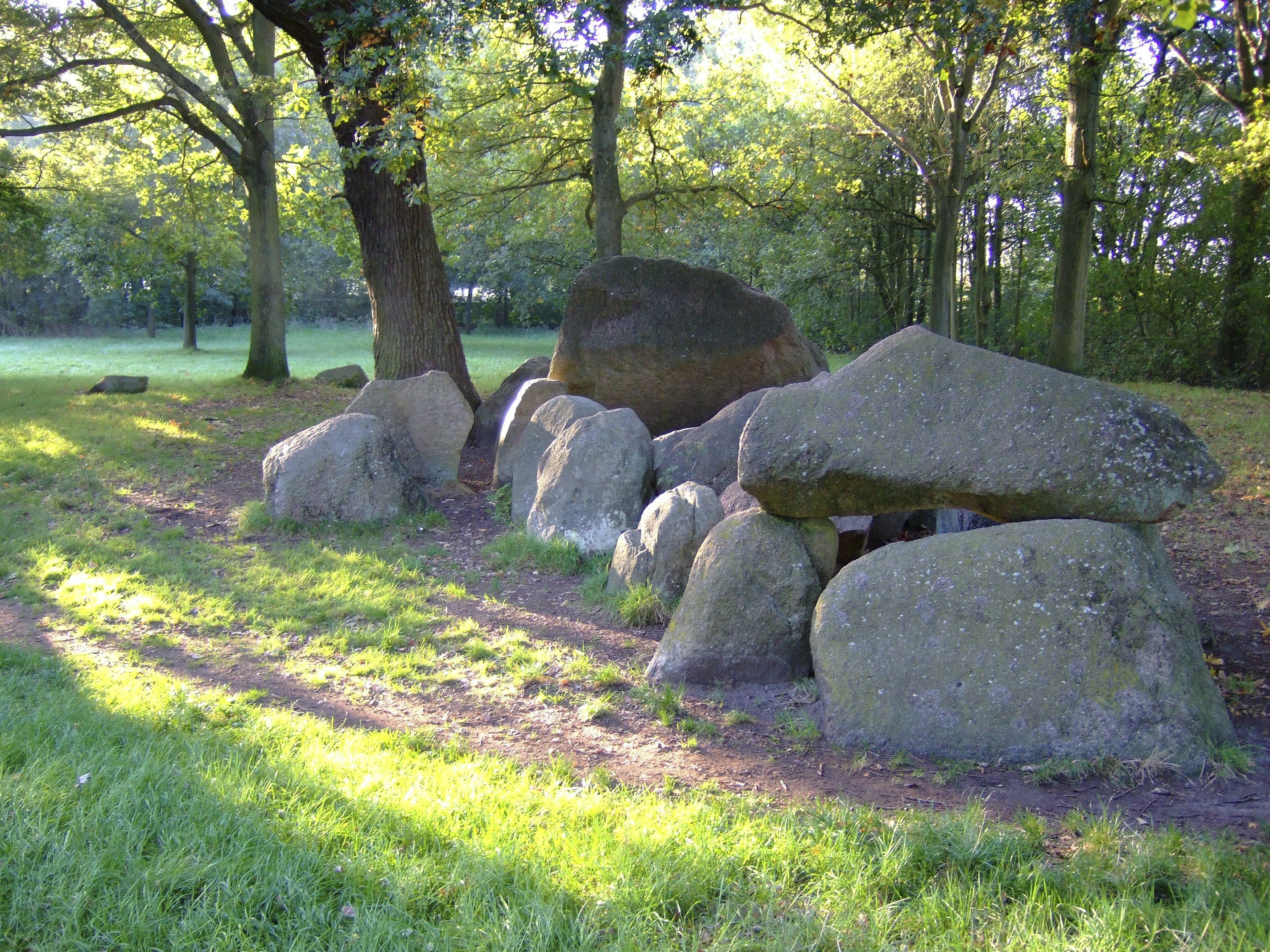 Archeologie/ Hunebed: Zicht op hunebed D17 in bos gelegen, Archeoregio 1 (opmerking: Publicatie Uit Balans 2006)